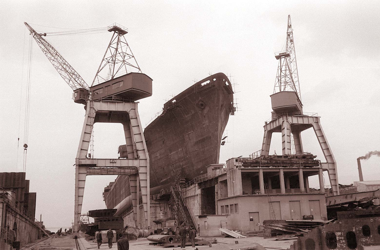 Ladjedelnica 3. maj Rijeka